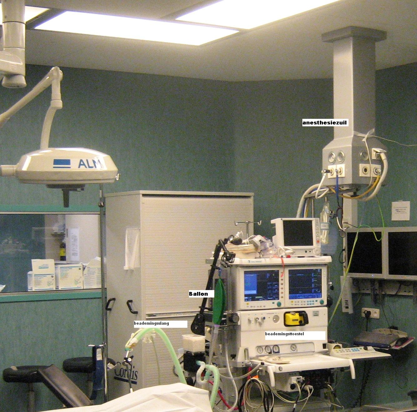 beademingstoestel op een operatiekamer 'eigen werk' Ik heb deze foto zelf gemaakt, daarna met paint wat tekstblokjes toegevoegd en ga akkoord met plaatsen op internet en eventueel gebruik door derden. QQQ1